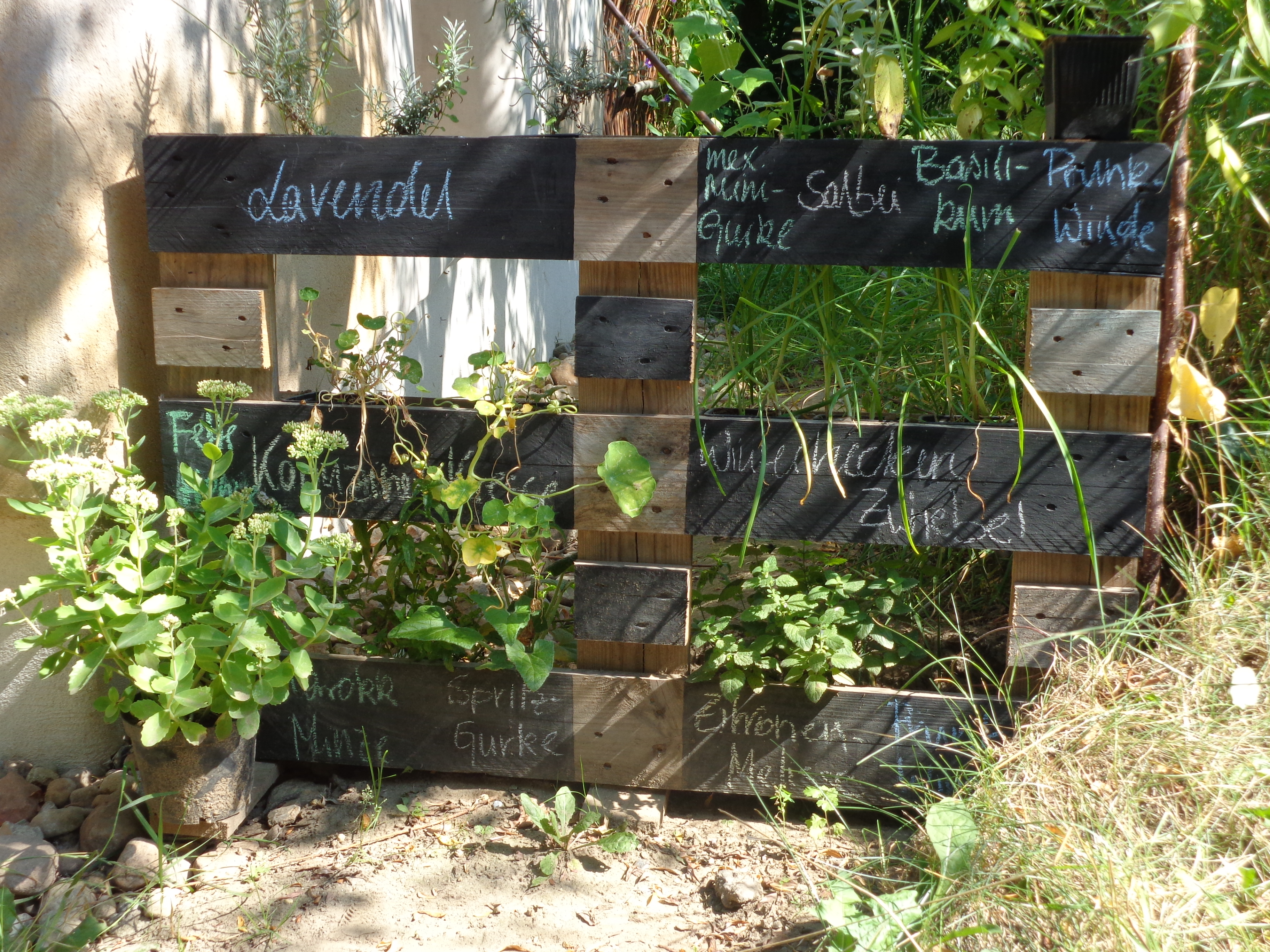 Umfunktionierte Transportpalette für Kräuterpflanzen im Wangeliner Garten.